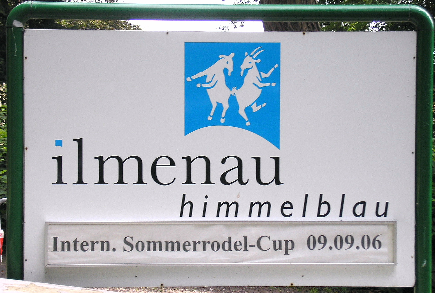 Tafel am Ortseingang (K56 von Neustadt/Frauenwald) Ilmenau mit dem Stadtmotto Ilmenau - Himmelblau sowie aktuellen Veranstaltungshinweisen.